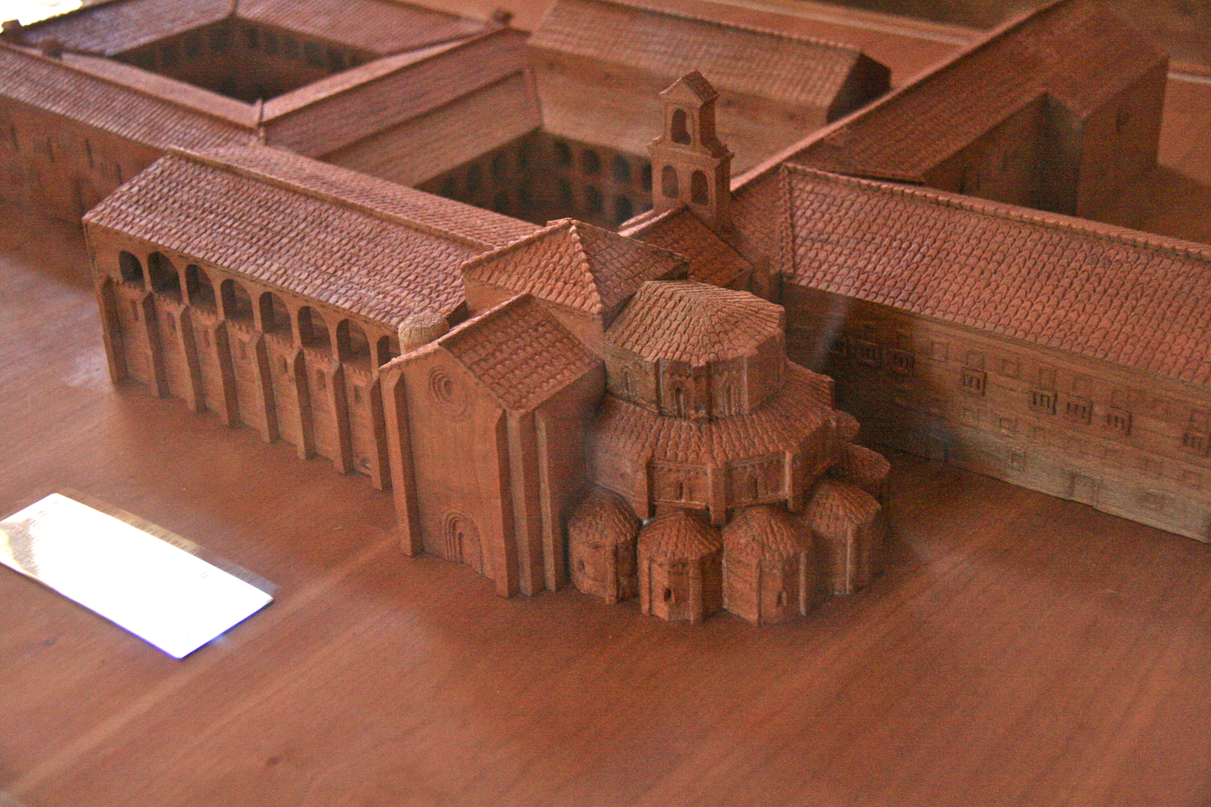 Maqueta de la cabeceradel Monasterio de Santa María de Moreruela (Zamora)